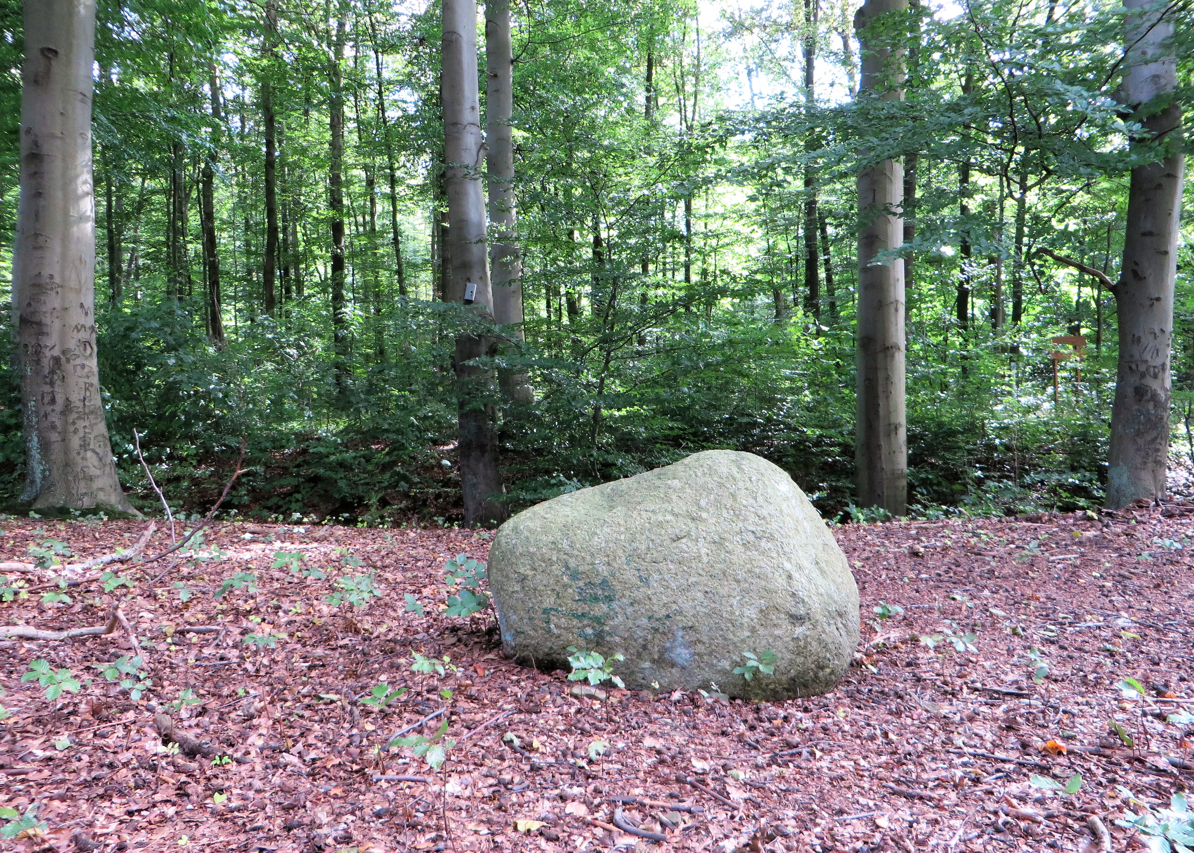 Naturdenkmal 1.3.2.2.5 „Findling Vorhalle“ in Hagen-Vorhalle, Am Tempel/Im Stell. Es handelt sich um einen im Hagener Raum sehr seltenen Findling aus grauem Revsundgranit (Nordschweden) am Hülsbergbach westlich von Vorhalle. Der abgebildete Bereich liegt im Landschaftsschutzgebiet „Hülsbergbach“.